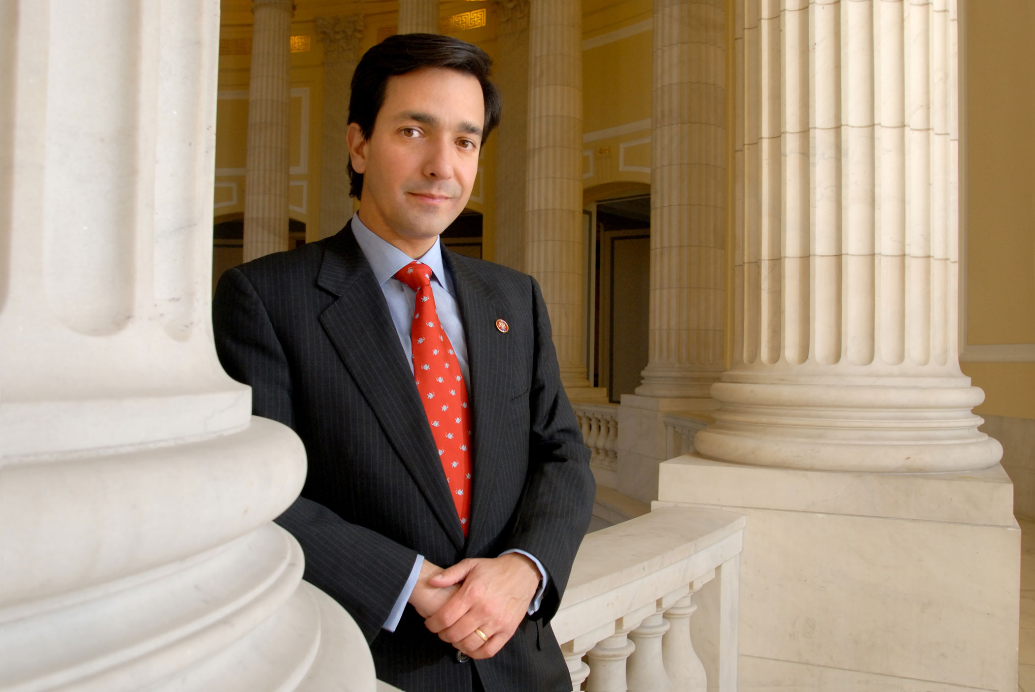 Foto oficial del congresista Fortuno, foto publica de un miembro del Congreso de EE. UU.